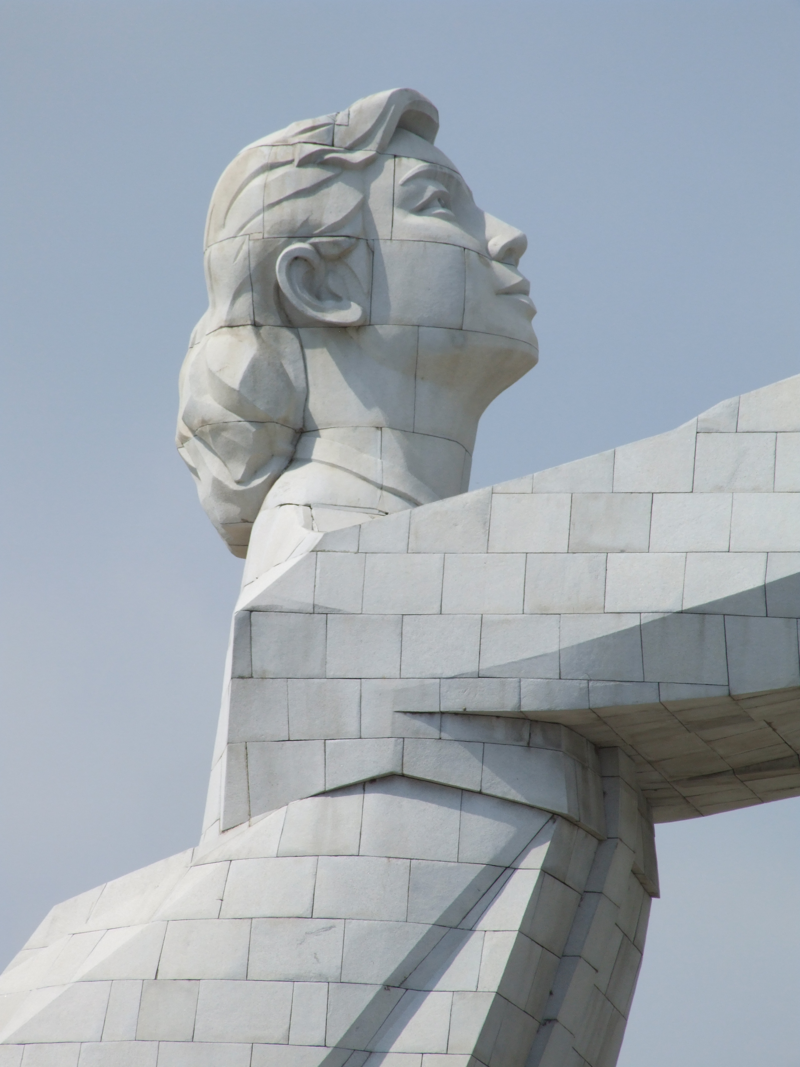 Denkmal für die Wiedervereinigung in Pjöngjang, Nordkorea